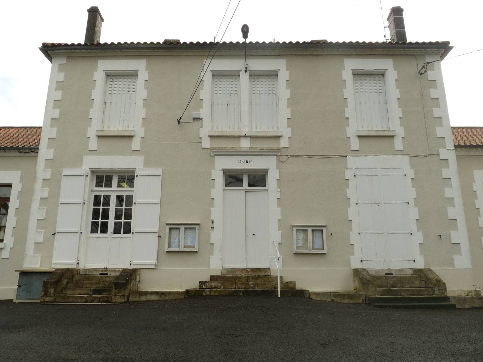 mairie de Roussines, Charente, France